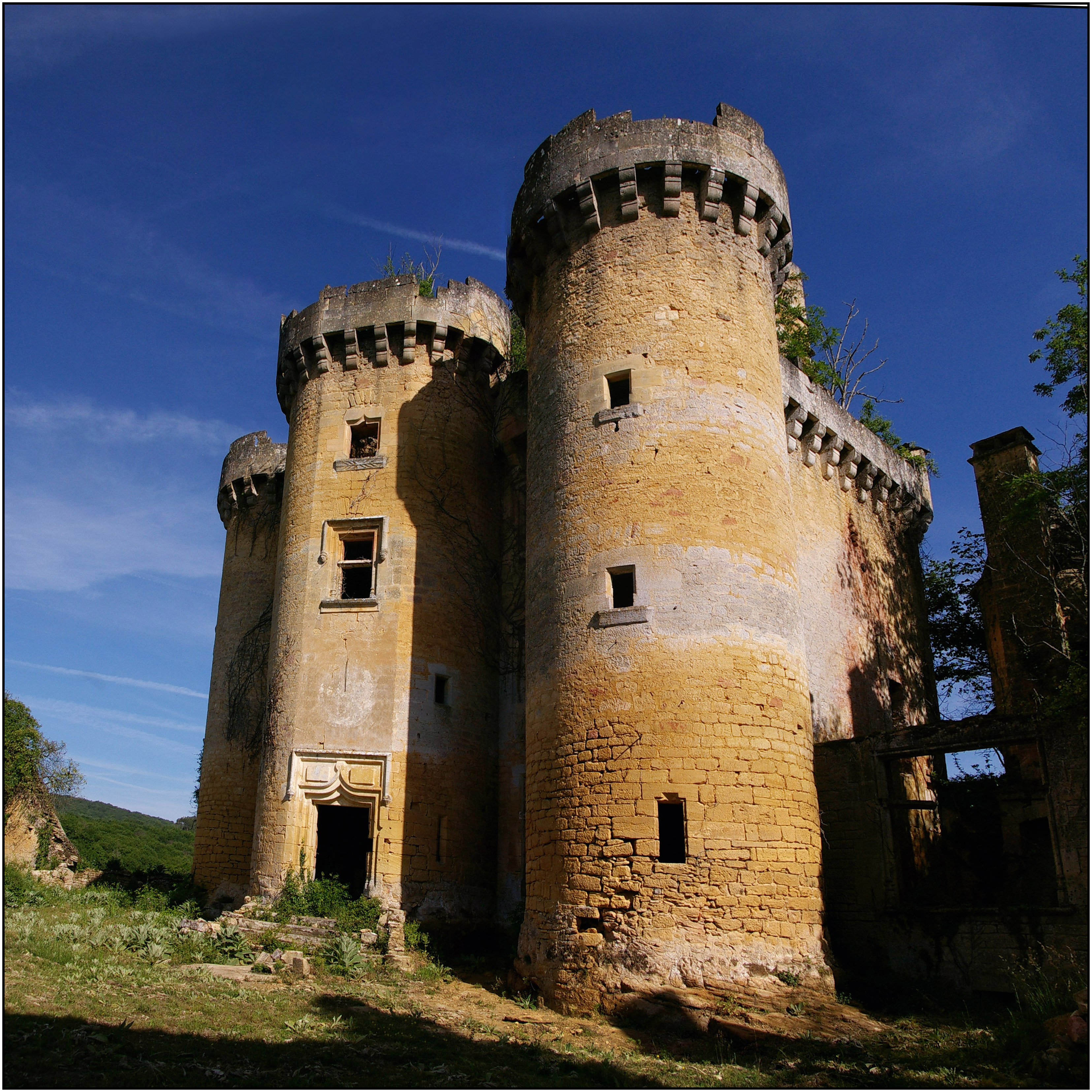 Château de Paluel, Saint-Vincent-le-Paluel